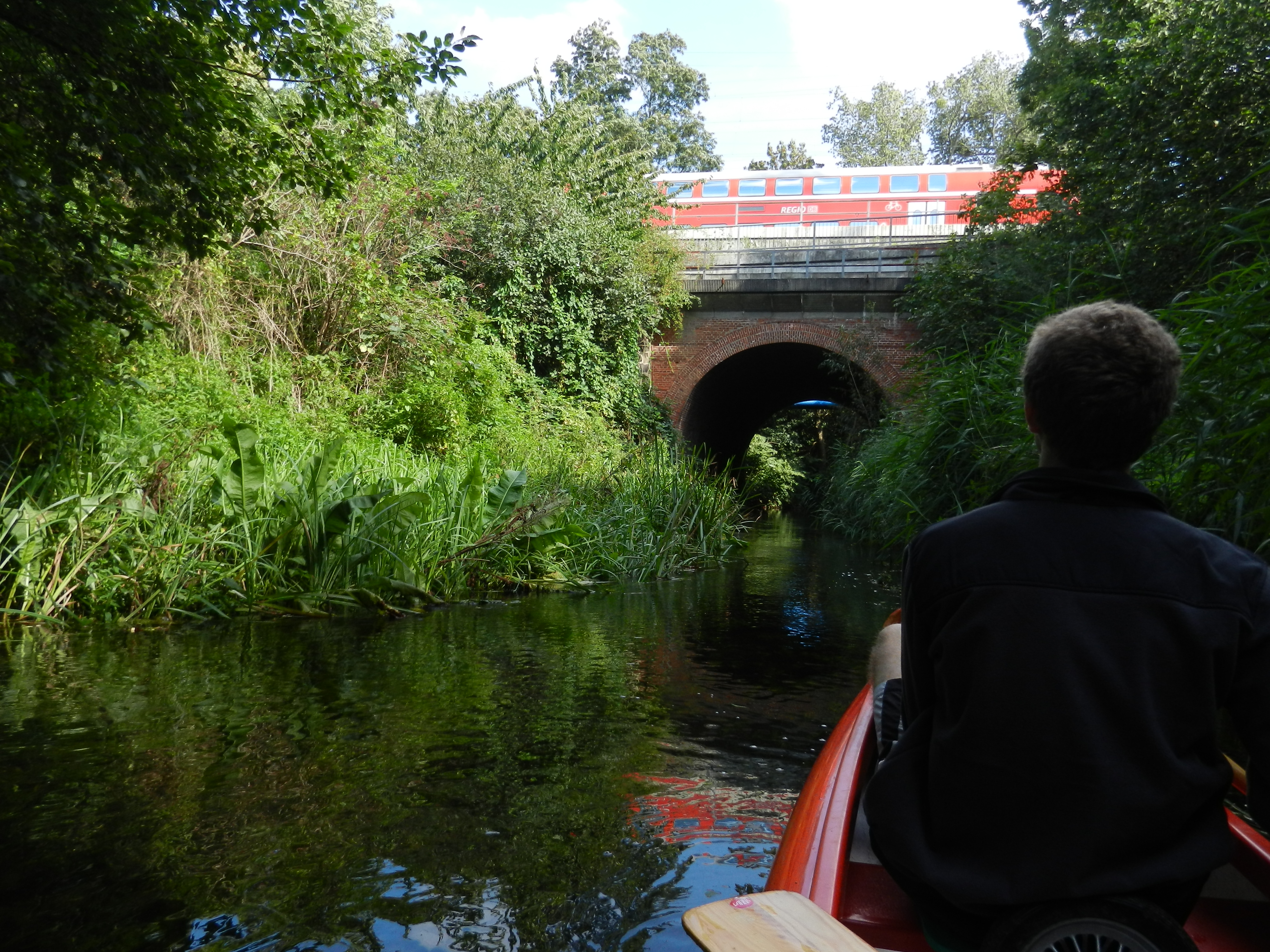 Eisenbahnbrücke über den Aubach bei Schwerin, Strecke 6441 Ludwigslust-Wismar